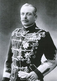 генерал Шарпантье